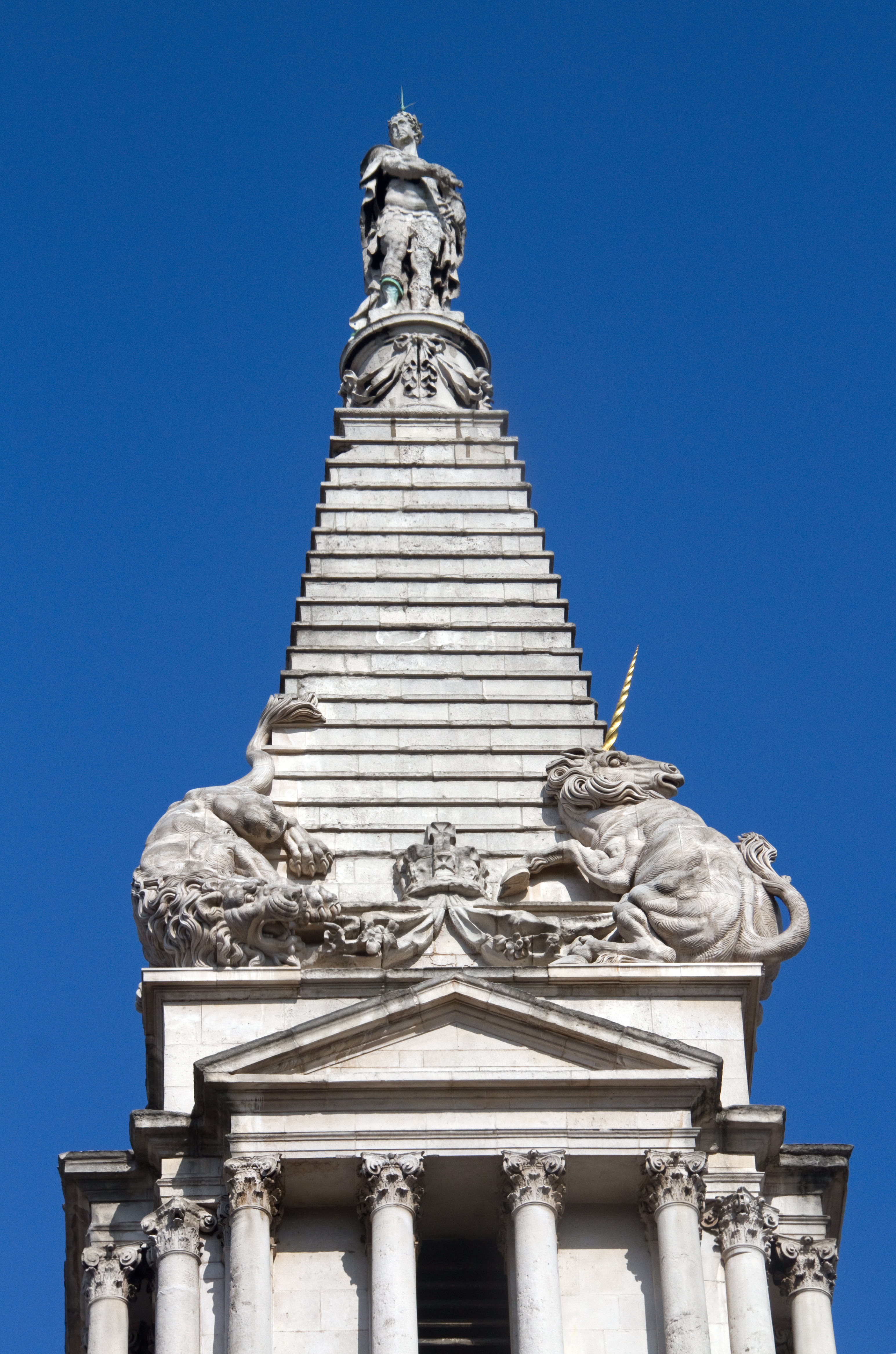 Spire